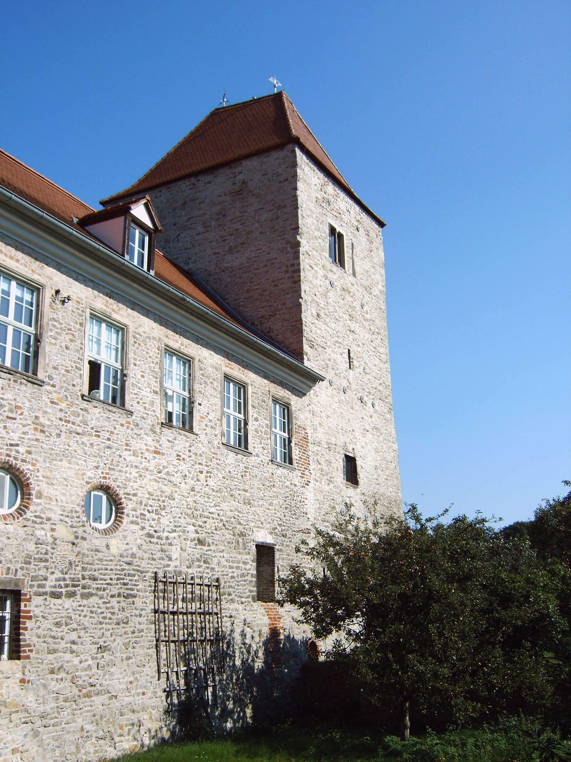 Burg Wanzleben